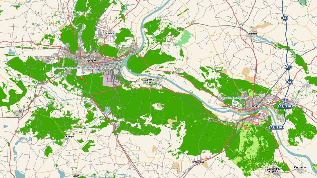 Mapa Puszczy Bydgoskiej